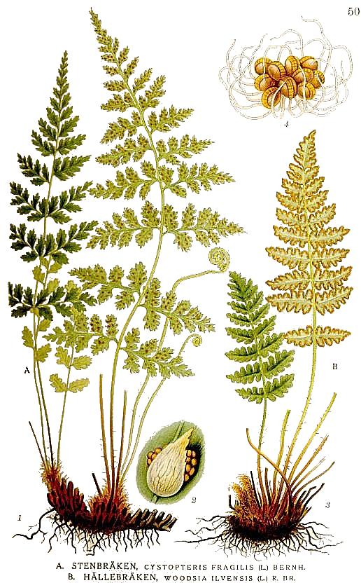 Original Description A. Stenbräken, Cystopteris fragilis (L.) Bernh. B. Hällebräken, Woodsia ilvensis (L.) R. Br.